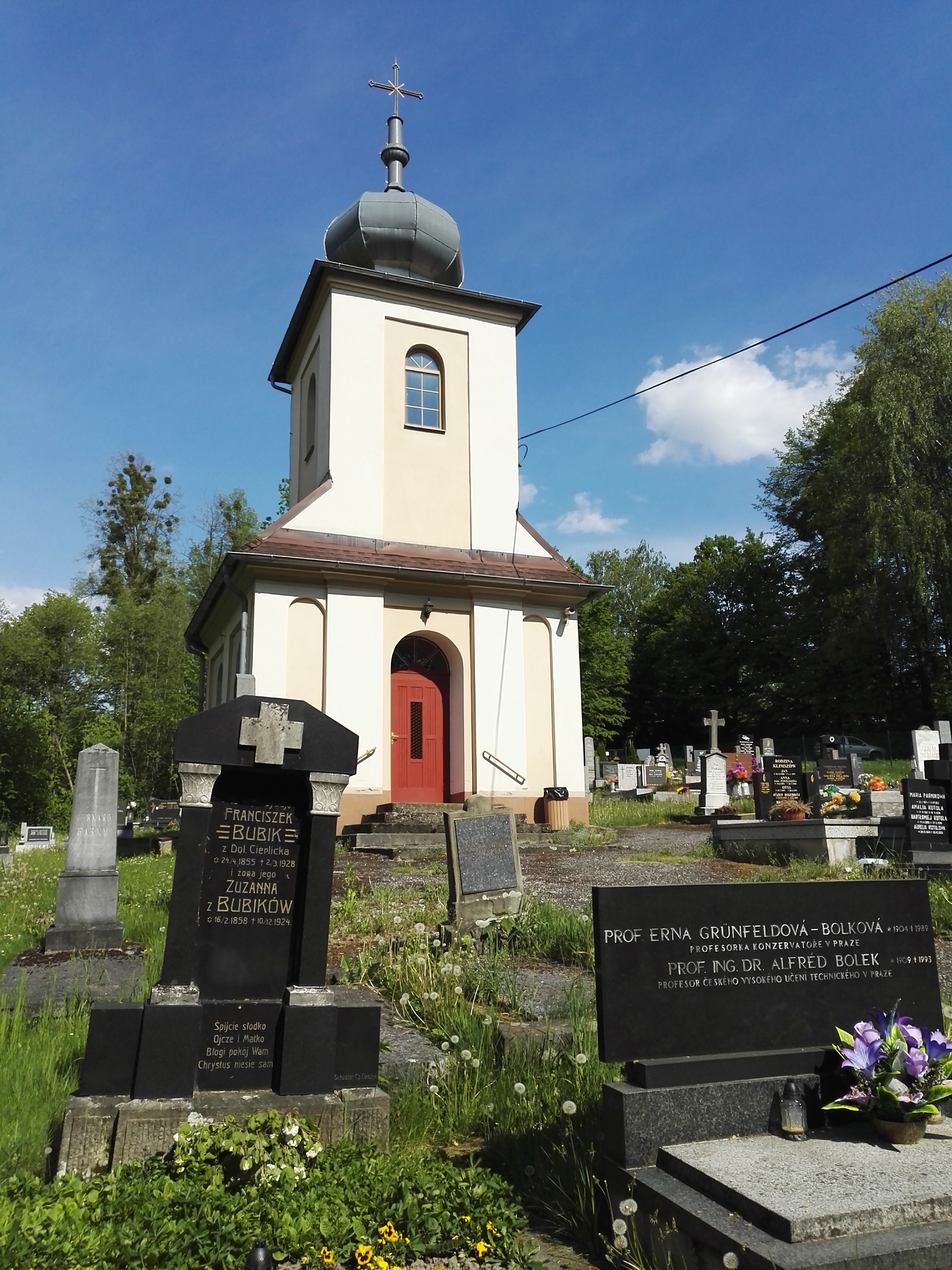 Horní Těrlicko. Evangelický hřbitov.